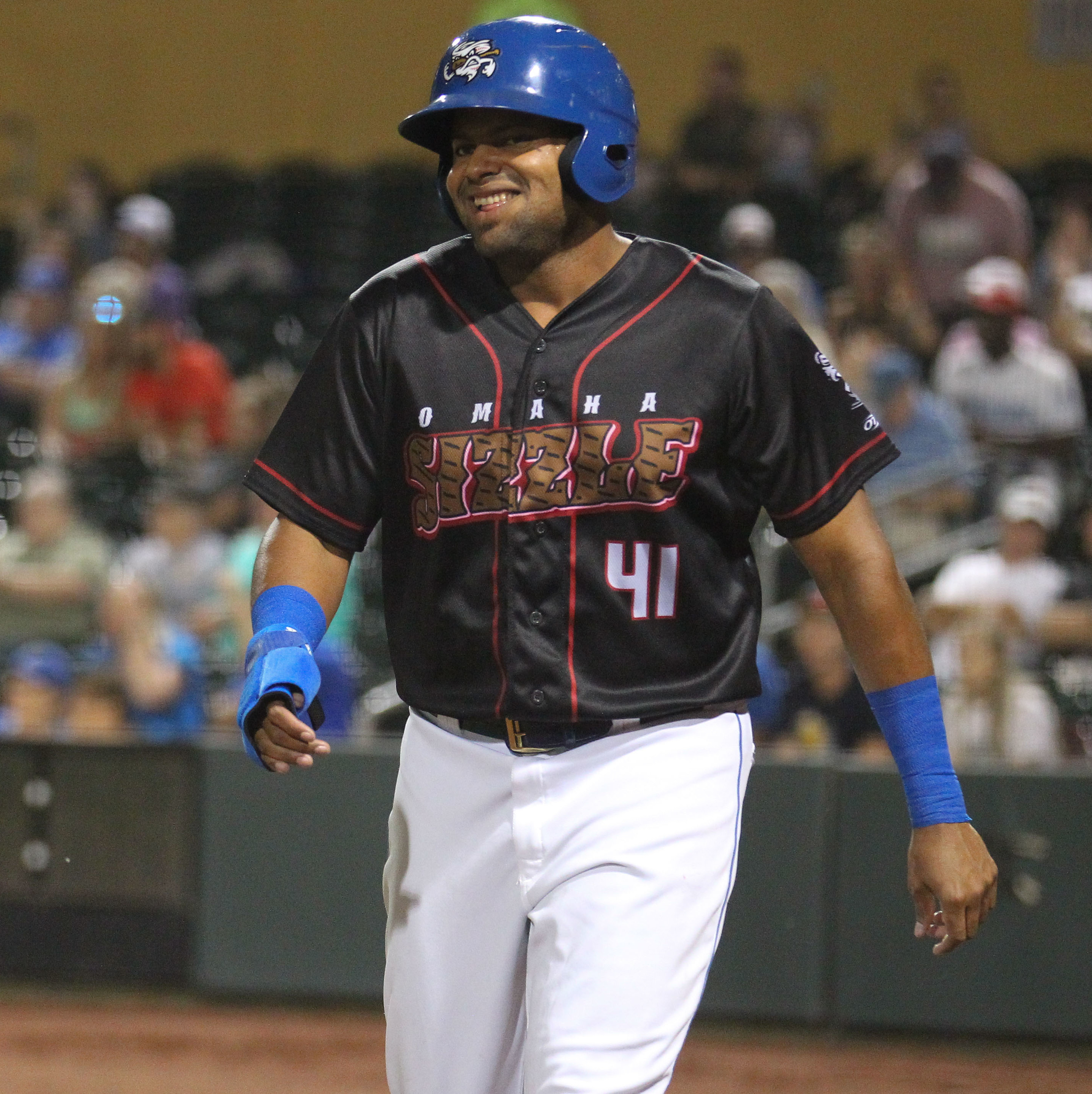 Jorge Bonifacio